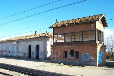 Edificio de viajeros de la estación de ferrocarril de Calatorao (Zaragoza) antes de su derribo. A la derecha se ve la caseta de cambio de agujas.